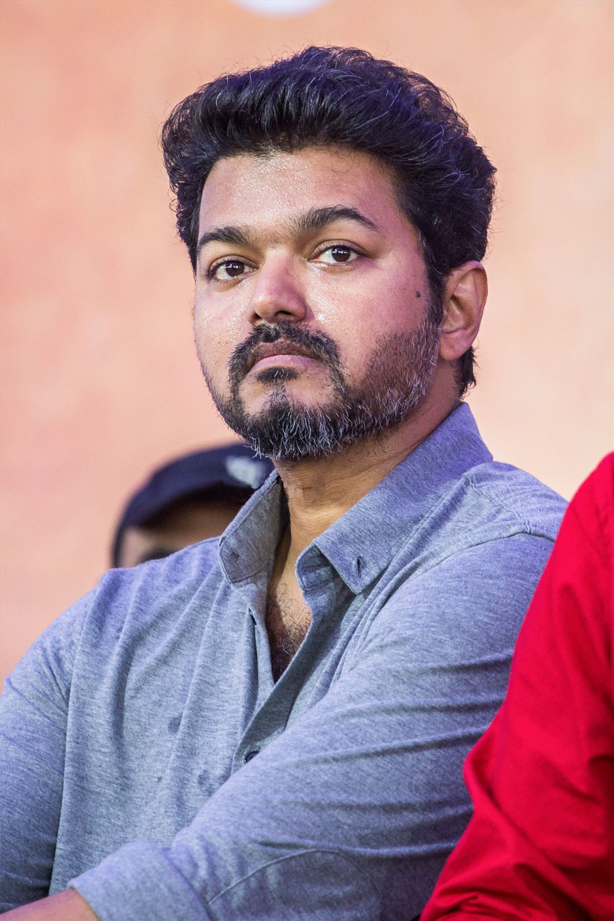 Vijay at the Nadigar Sangam Protest